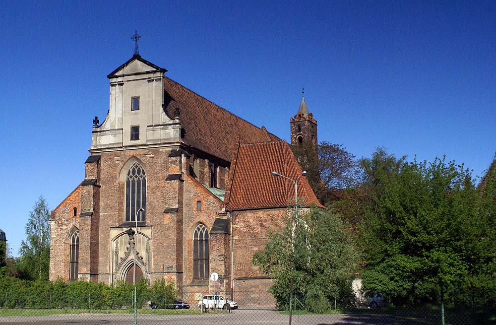 Wrocław Stare Miasto, ul. Bernardyńska 8 - dawny kościół klasztorny pw. św. Bernardyna, obecnie Muzeum Architektury (zabytek A/1298/16)